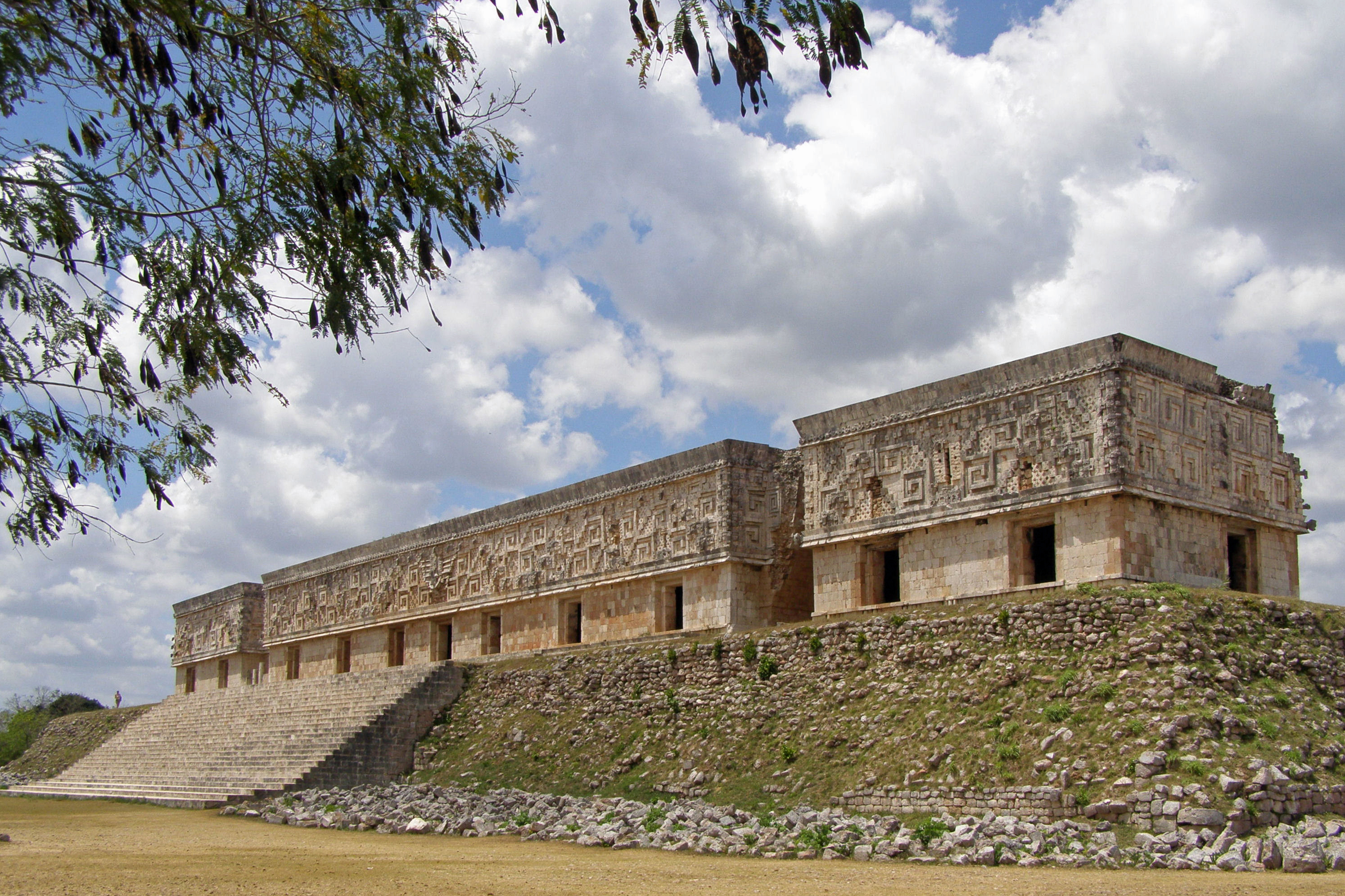 Le "palais du Gouverneur" - Site archéologique d'Uxmal (Mexique)